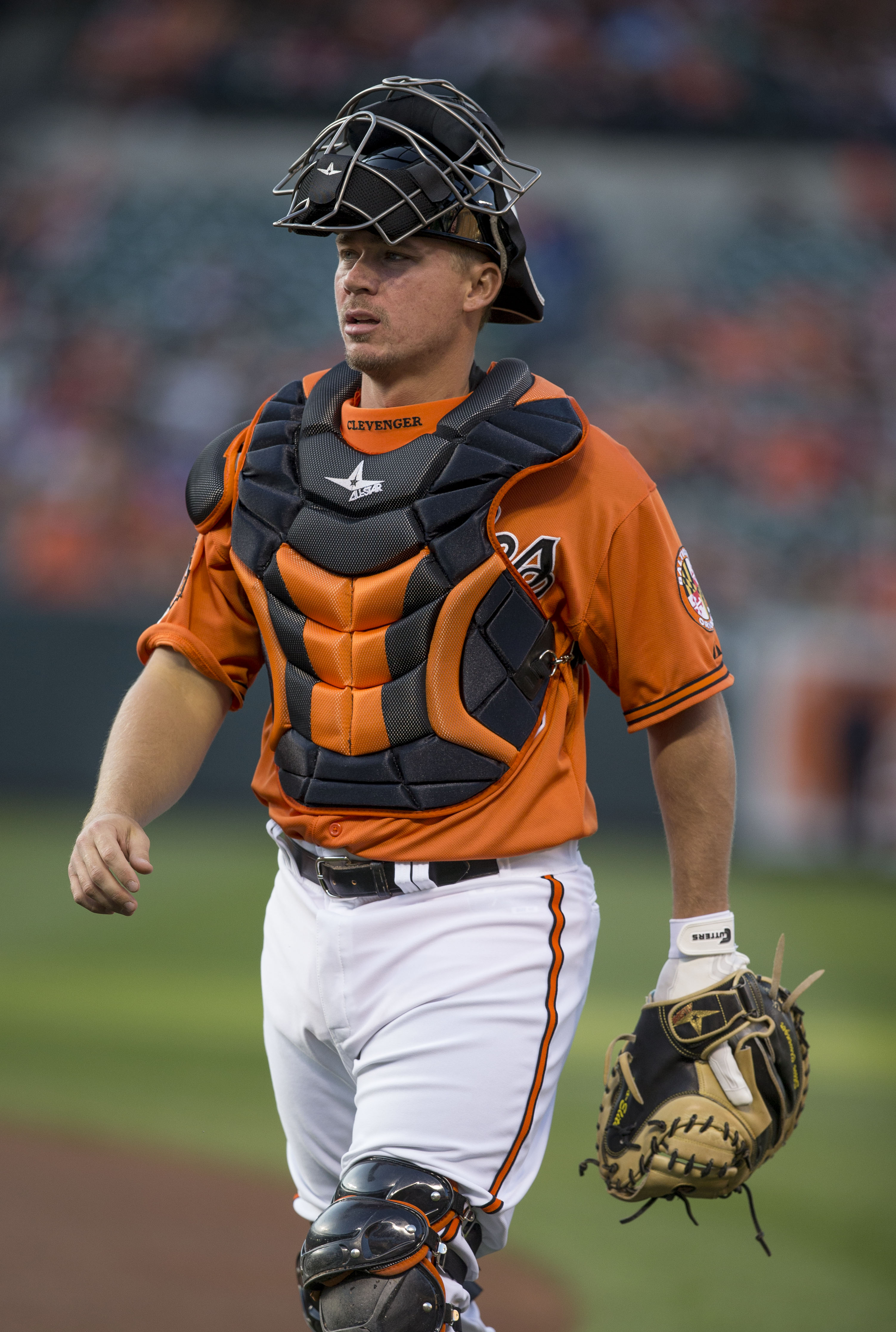 Steve Clevenger